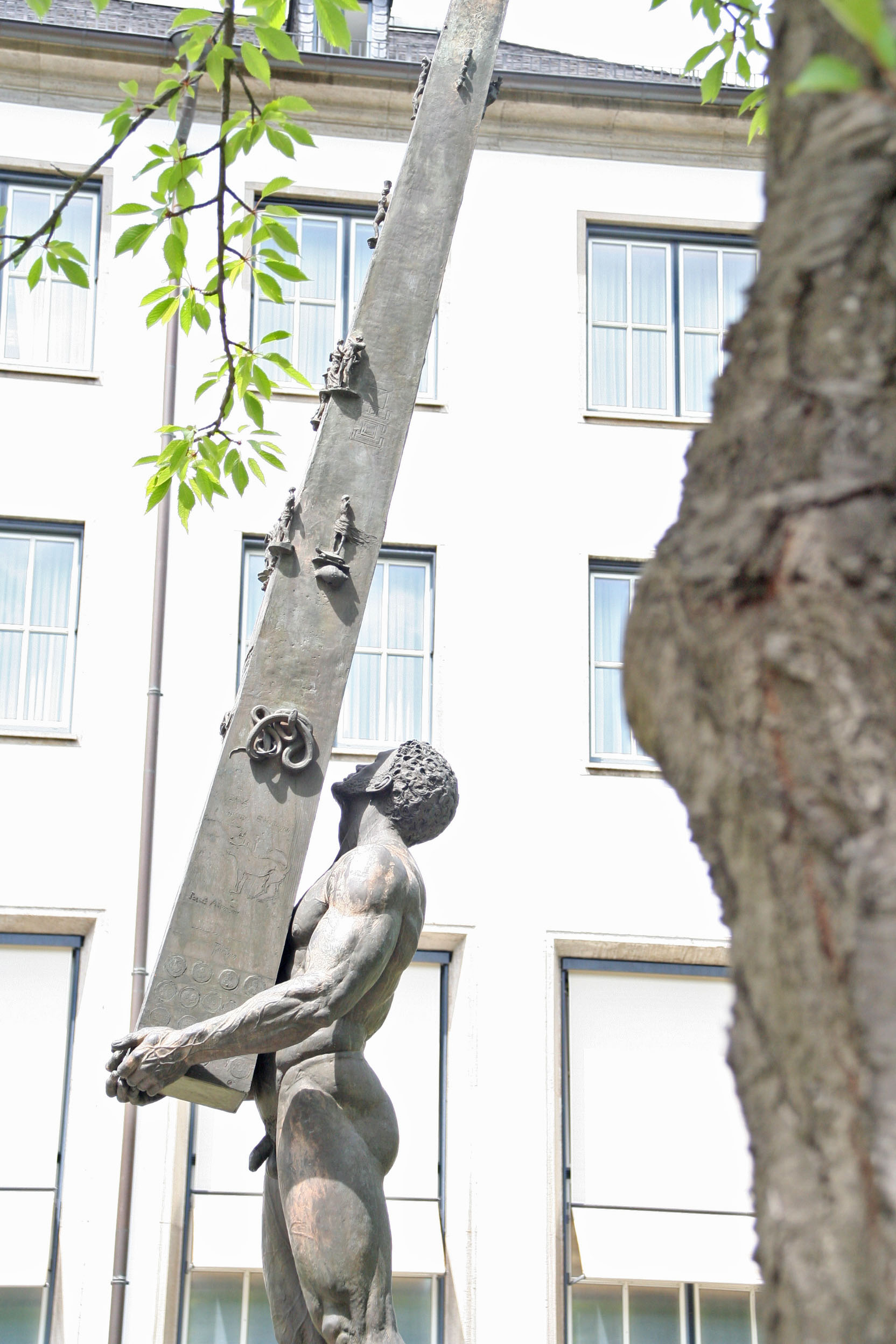 statue im vorbereich der bundesbank am ständeplatz